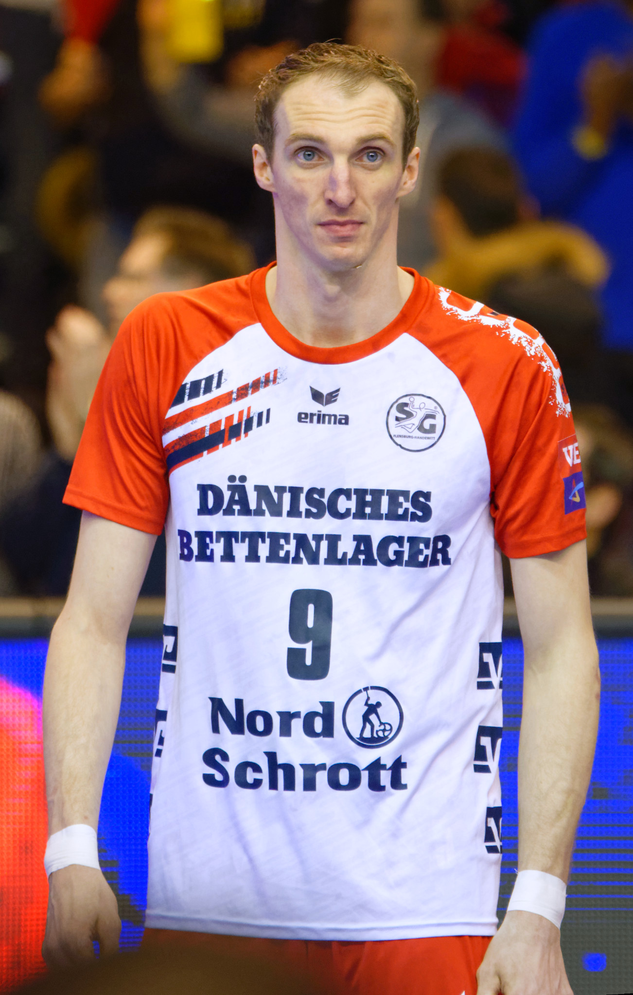 Rencontre de phase de groupe de la Ligue des Champions 2015-16 entre le PSG et SG Flensburg. A la Halle Carpentier (Paris), le 7 mars 2016.